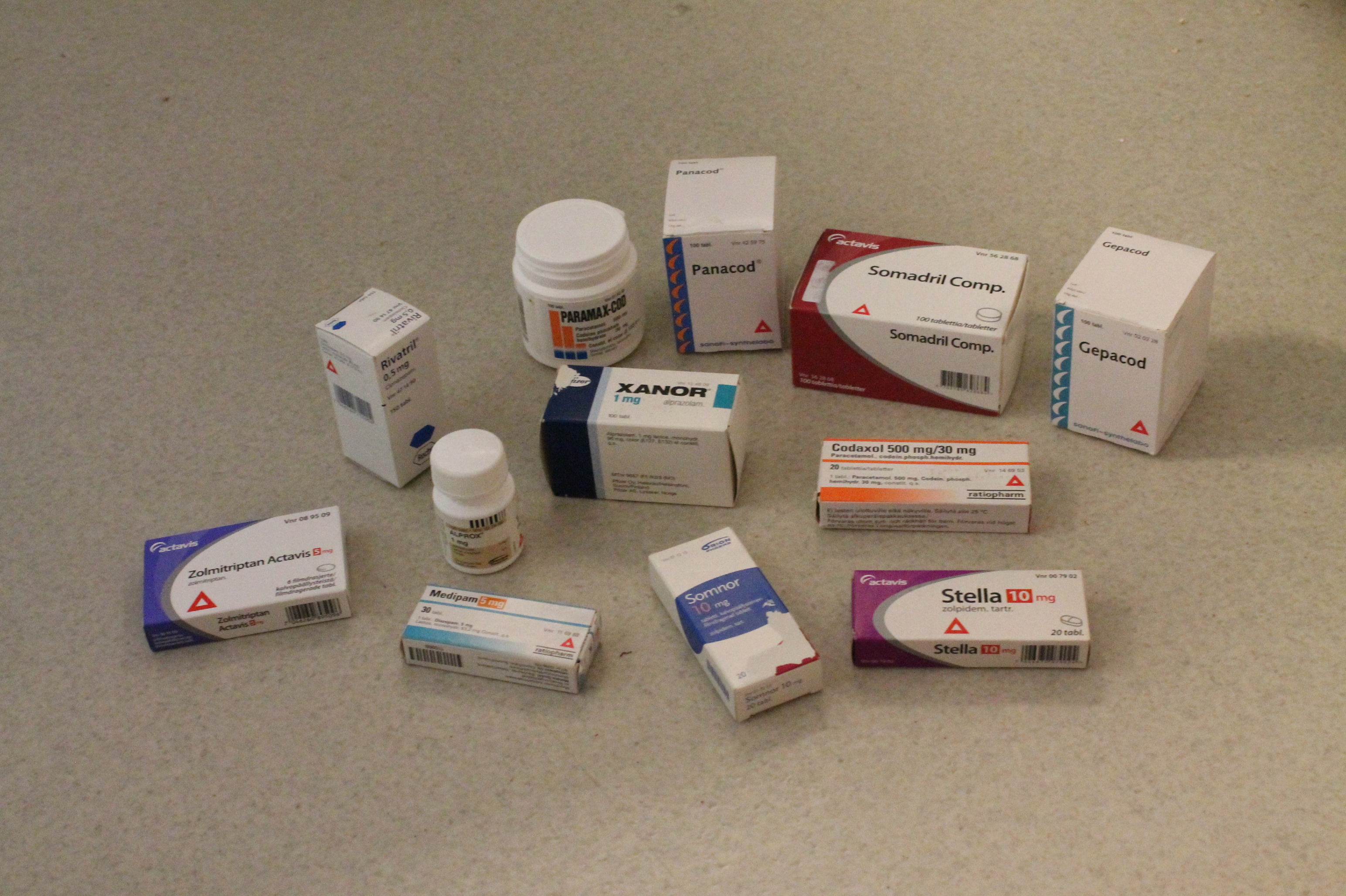 PKV-lääkkeitä